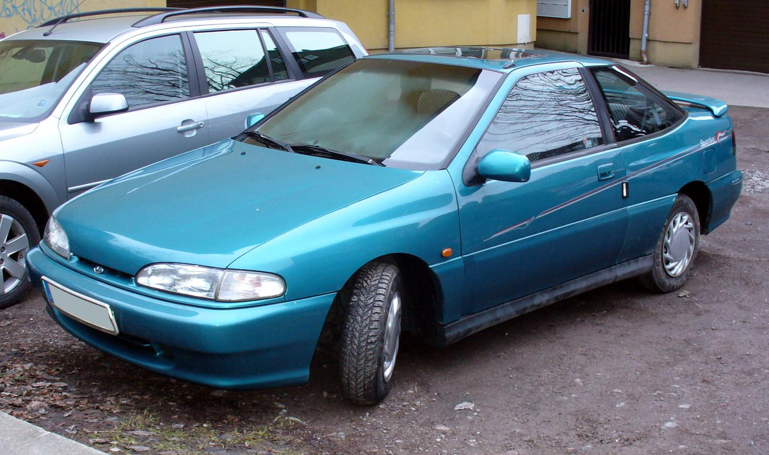 Hyundai S-Coupé